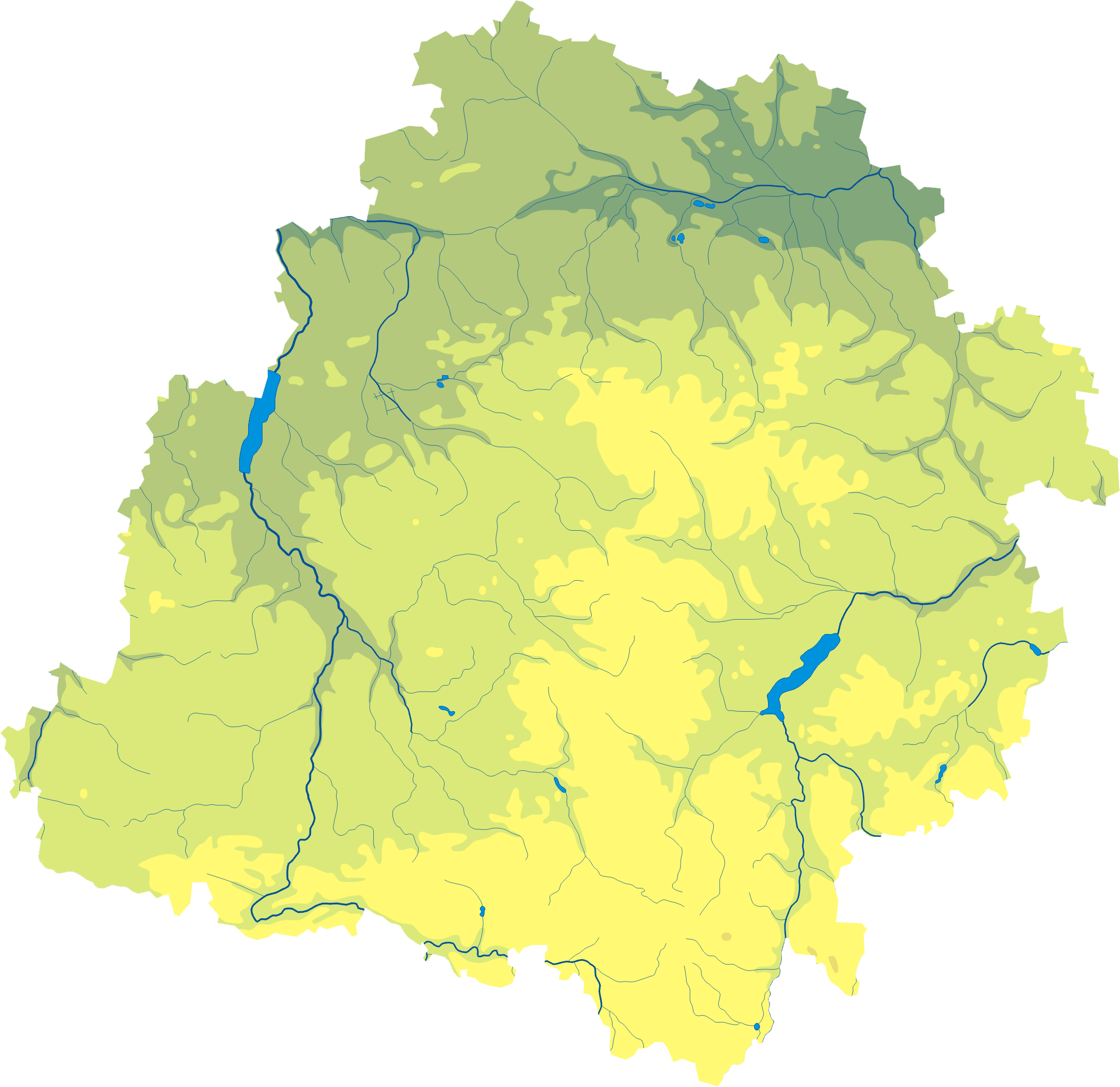 Mapa wód i ukształtowania powierzchni województwa łódzkiegoWspółrzędne graniczne mapy: N: 52.3940° N S: 50.8432° N W: 18.0746° E E: 20.6593° E Legenda